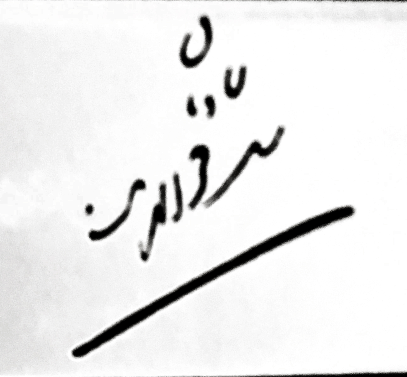 نمونه‌ی امضای فخرالدین شادمان